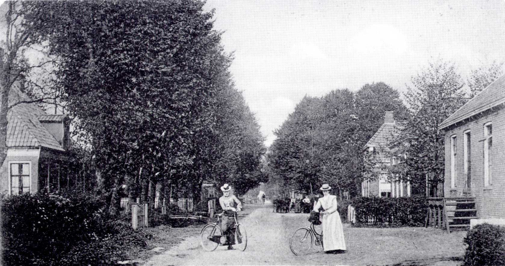 Gieterveen omstreeks 1905, links de pastorie aan de Broek 5 (prov.mon. PM1-0093)